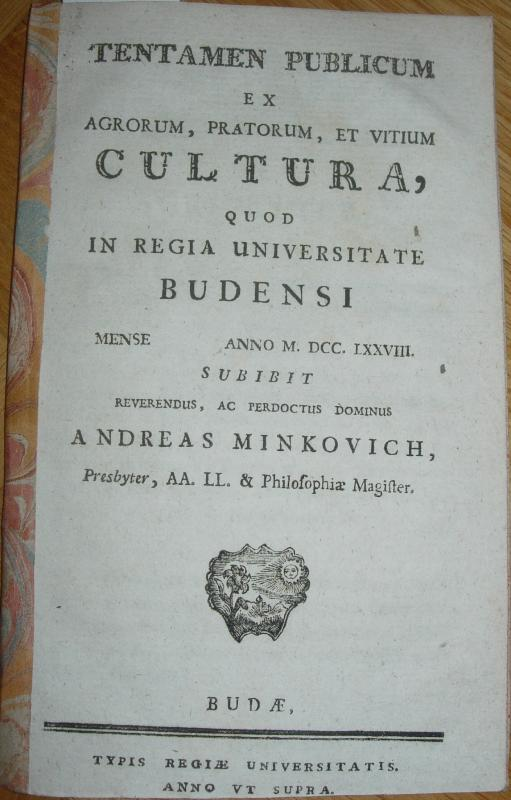 Minkovich, Andreas Tentamen publicum ex agrorum, pratorum, et vitium cultura, quod in regia Universitate Budensi mense anno M.DCC.LXXVIII. 12941 Buda, Universitäts-Druckerei, im Angebot bei Buchfreund.de